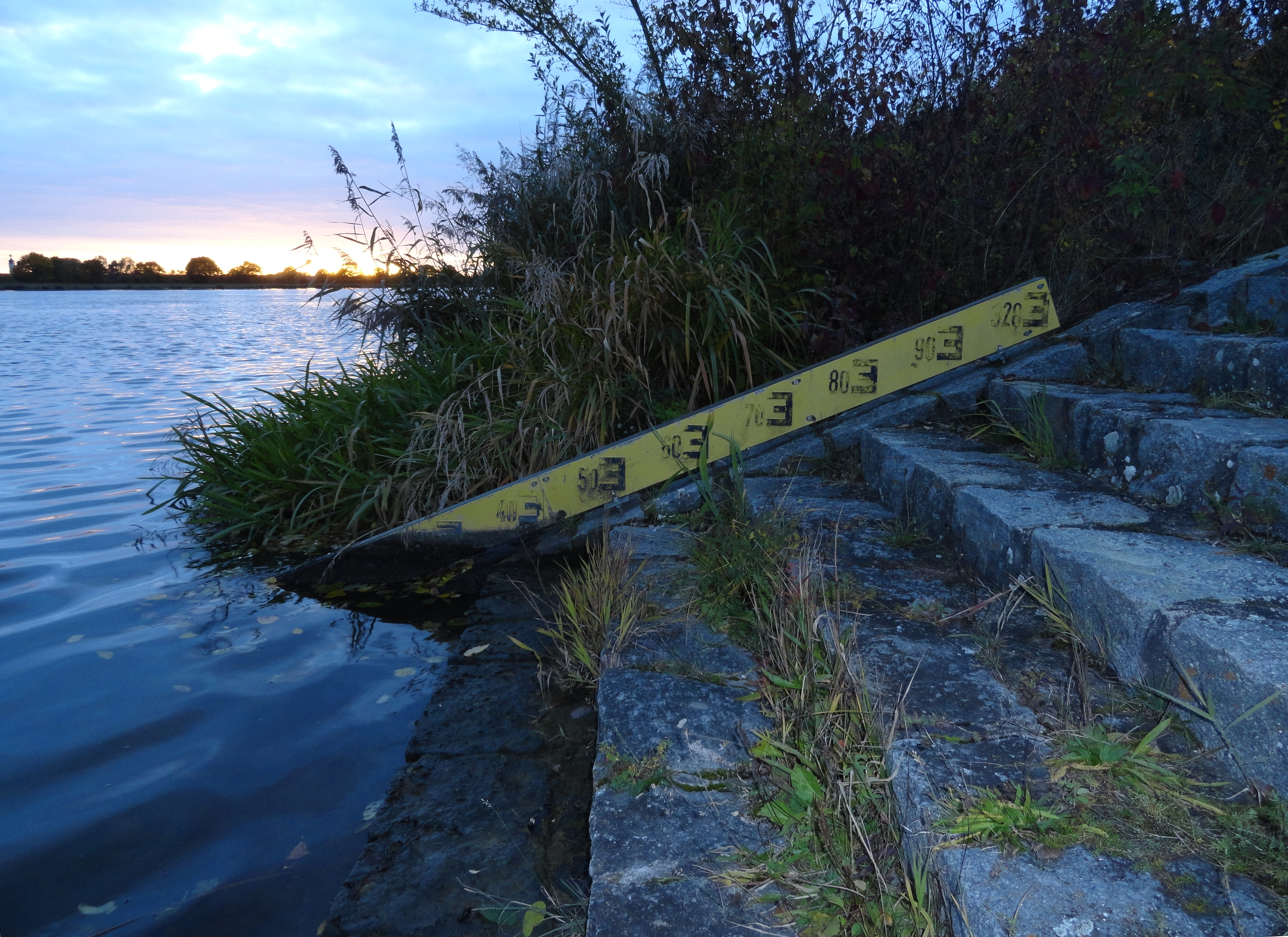 Treppenpegellatte im Oberwasser der Staustufe Geisling an der Donau; als Pegelwert kann 327, 20 abgelesen werden